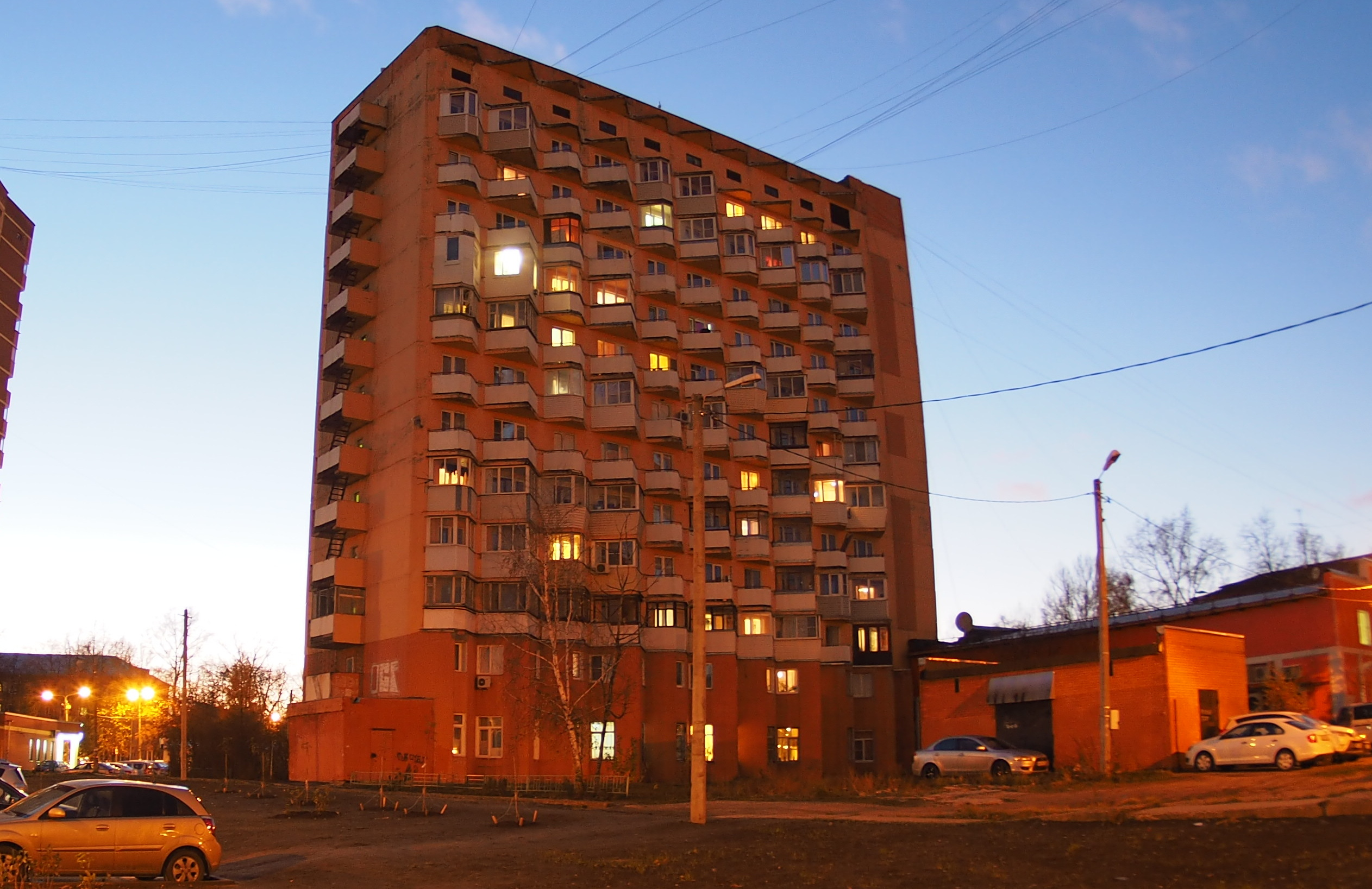 OLYMPUS DIGITAL CAMERA Moscow_Oblast #Lobnya Aeroportovskaja ulitsa 5 #Лобня Аэропортовская улица 5